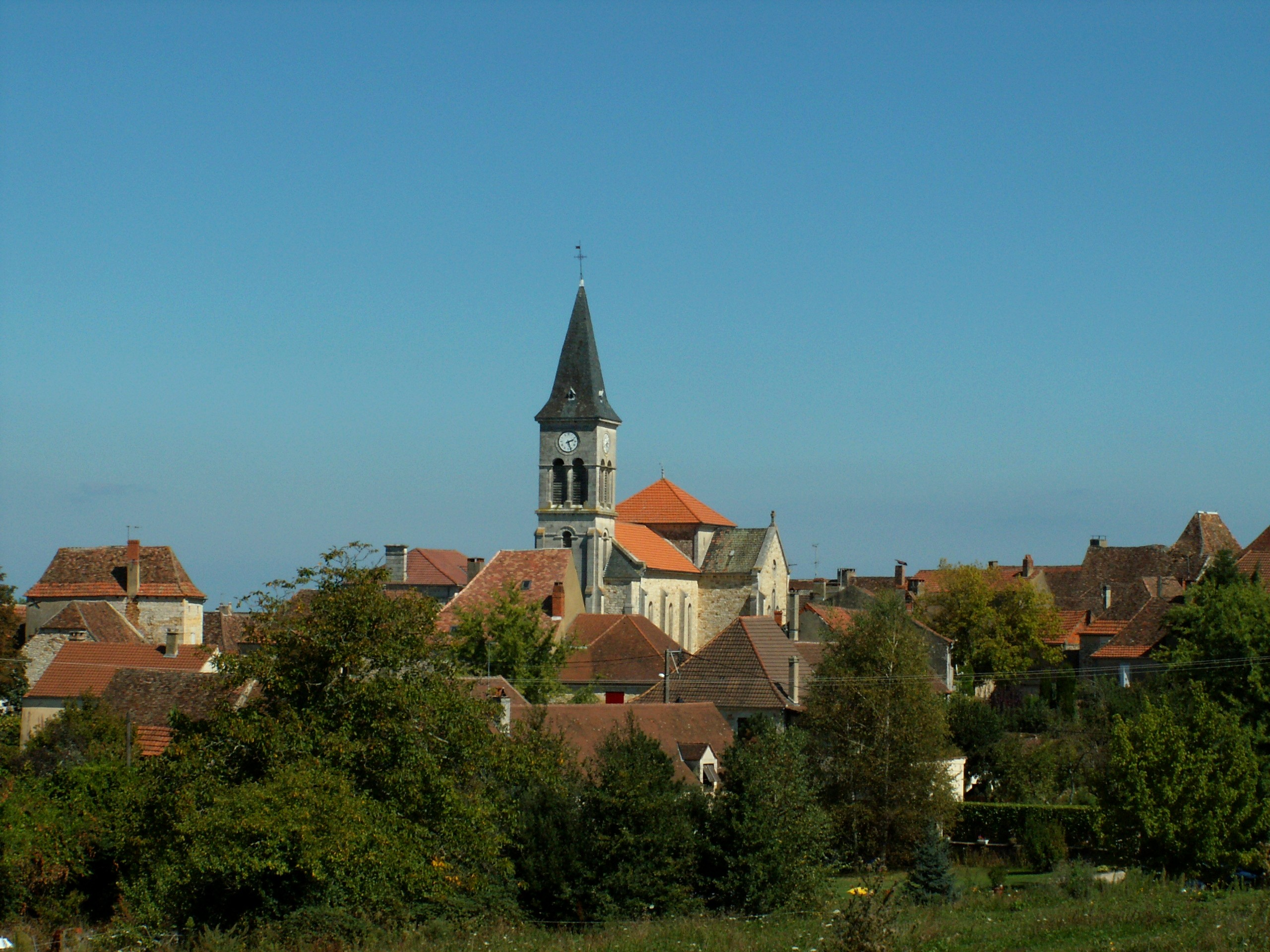 Vue de Payrac